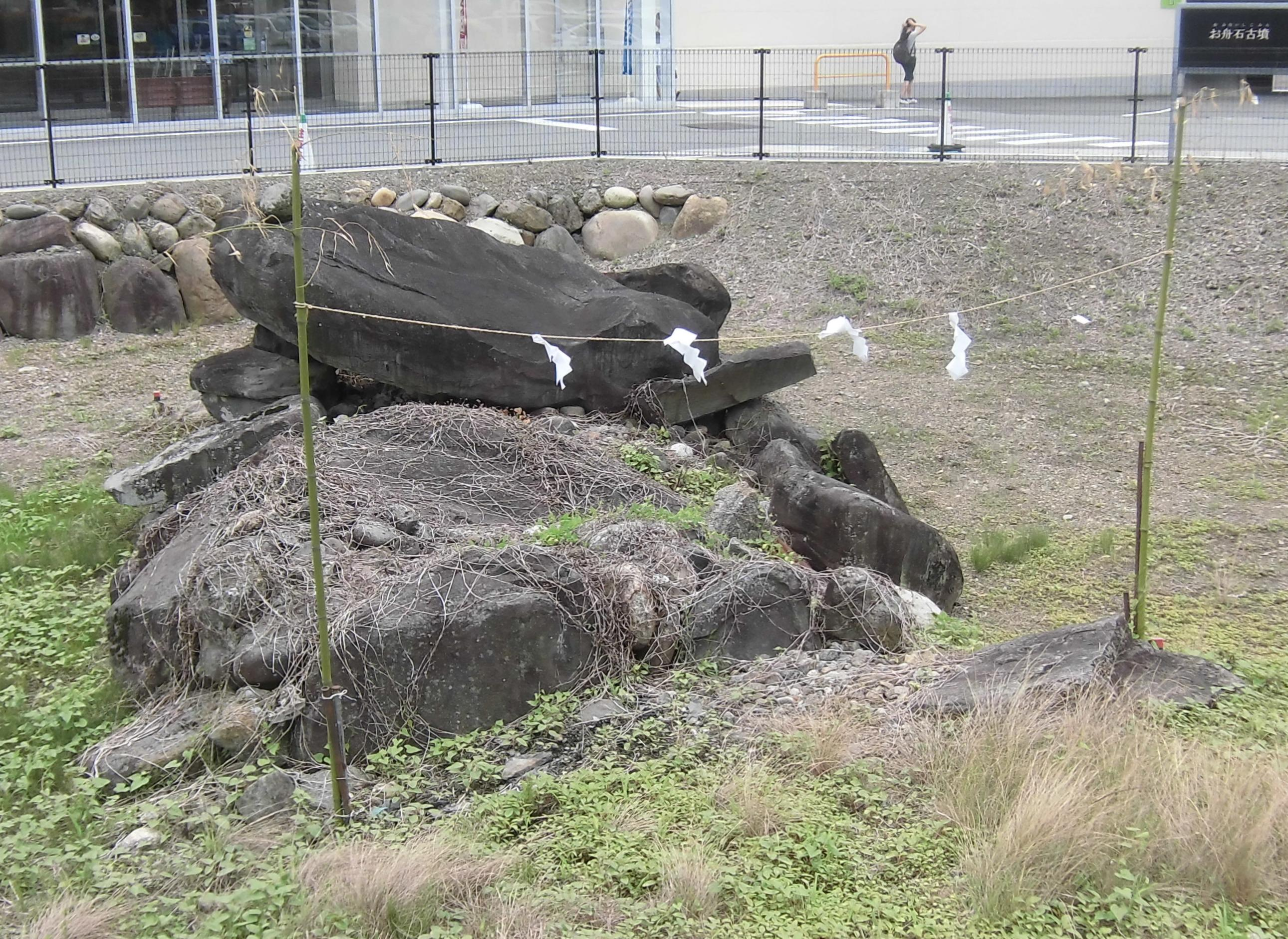 お船石古墳（山梨県甲斐市志田）